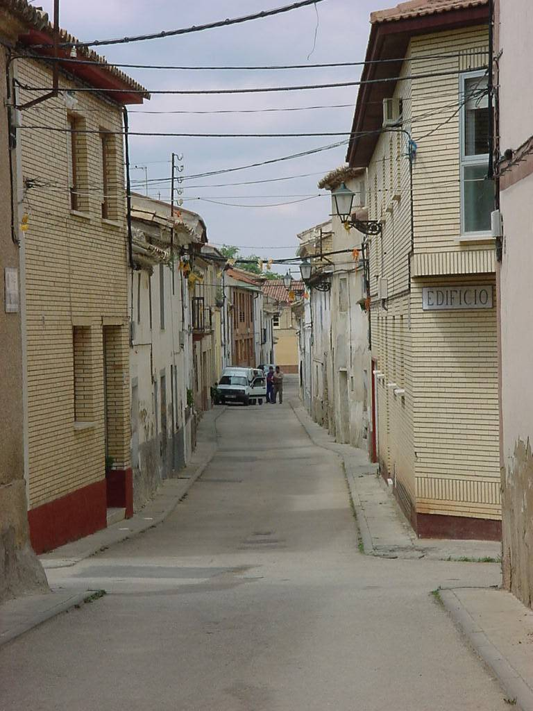 Subida por Eduardo Romero